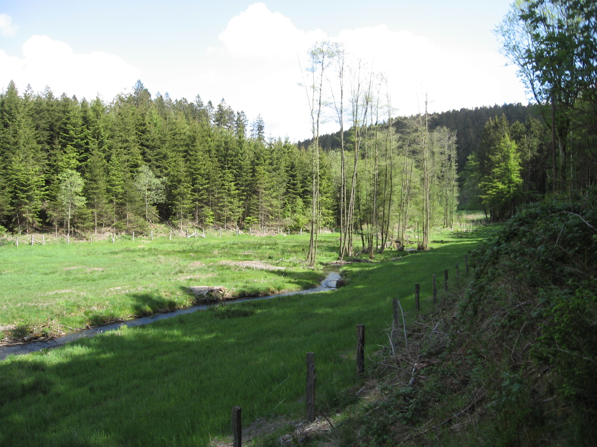 Naturschutzgebiet Talsystem der Glenne auf Höhe der Altenbürener Mühle nach Norden aufgenommen